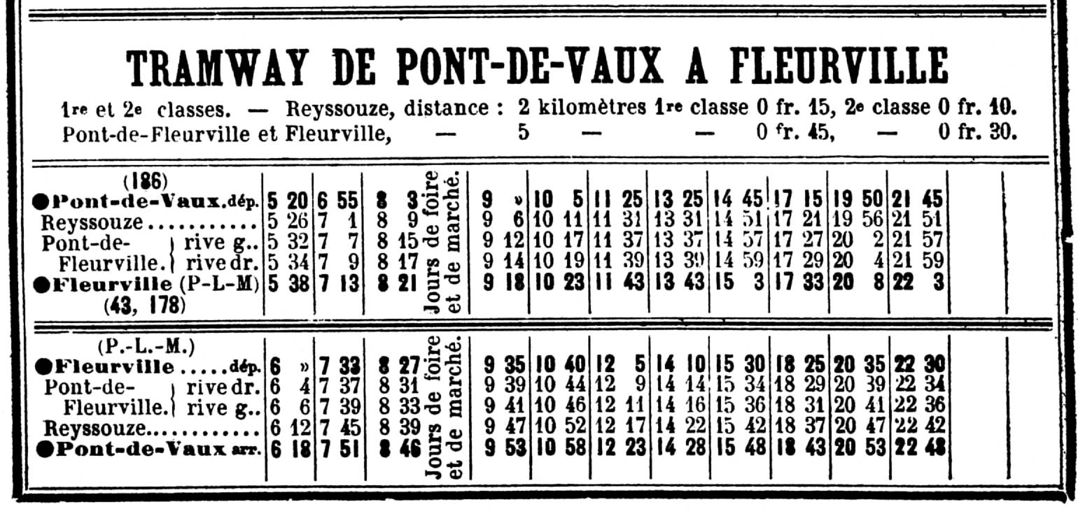 Indicateur Chaix des chemins de fer - Mai 1914 Ligne Pont-de-Vaux - Fleurville